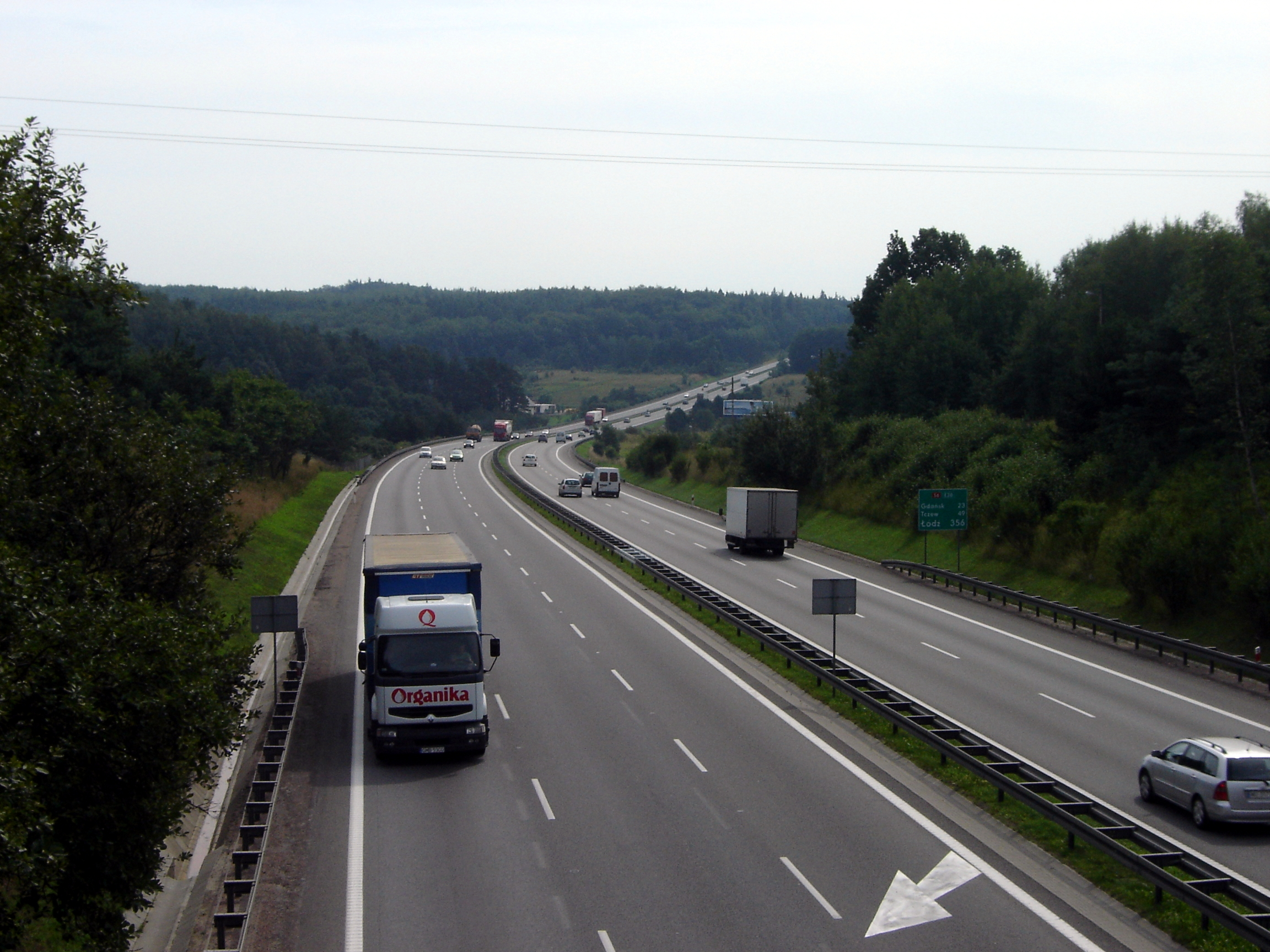 Trasa obwodowa Trójmiasta - zachodnia obwodnica Trójmiasta, część drogi ekspresowej S6. Obwodnica przebiega w kierunku północ-południe od Gdyni do Pruszcza Gdańskiego. Jej długość wynosi 38,6 km.